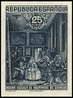 Sello benéfico